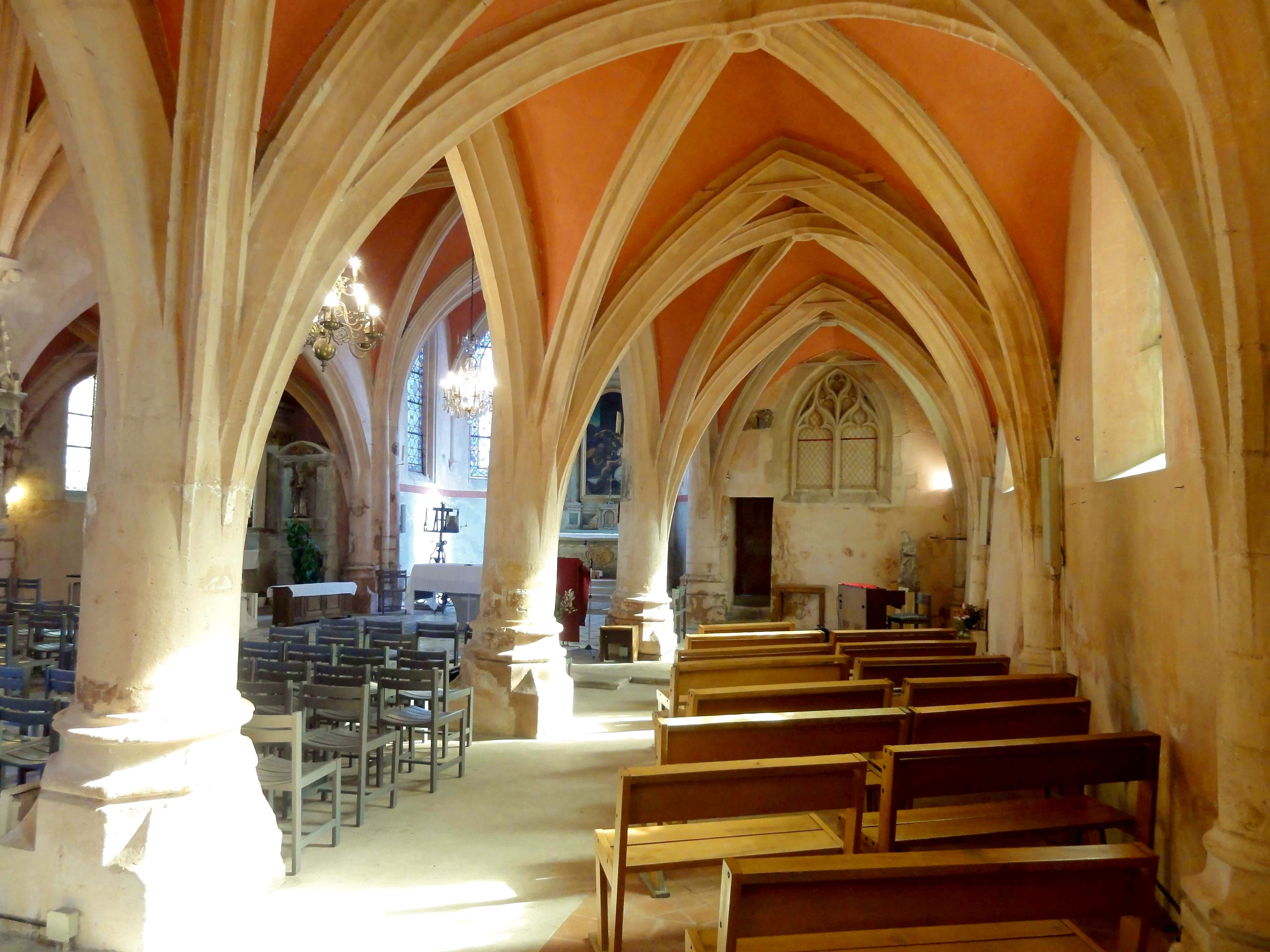 Intérieur de l'église - voir titre.